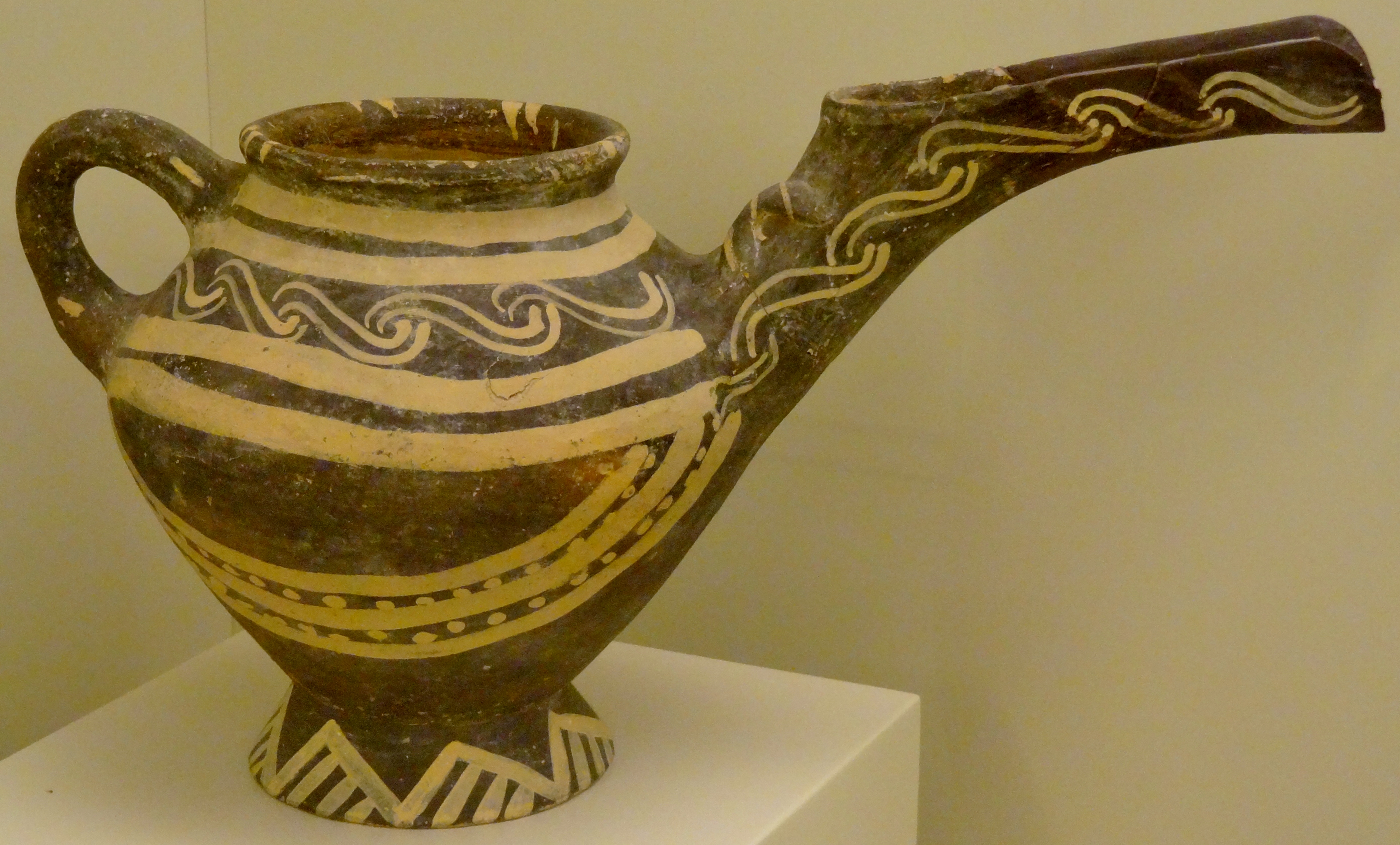 Teekannenförmiger Tonkrug/Schnabelkanne mit ornamentalem Weiß-auf-Schwarz-Dekor („Weißer Stil“, Vorpalastzeit, 2300–2000 v. Chr.) aus Vasiliki (Ierapetra), ausgestellt im Archäologischen Museum Iraklio, Kreta, Griechenland